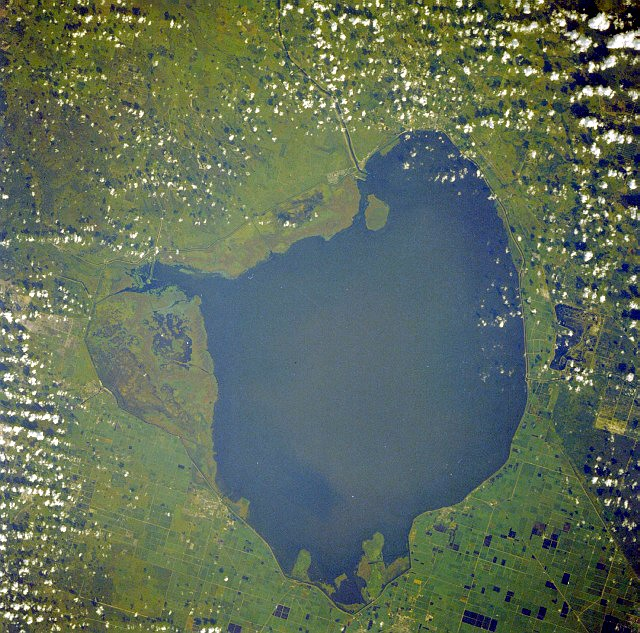 Lake Okeechobee seen from space